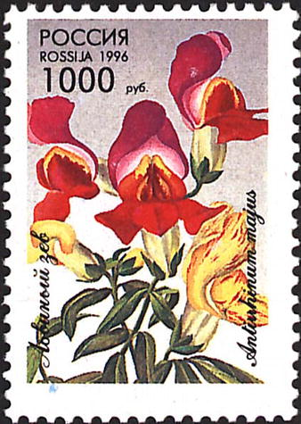 Почтовая марка России